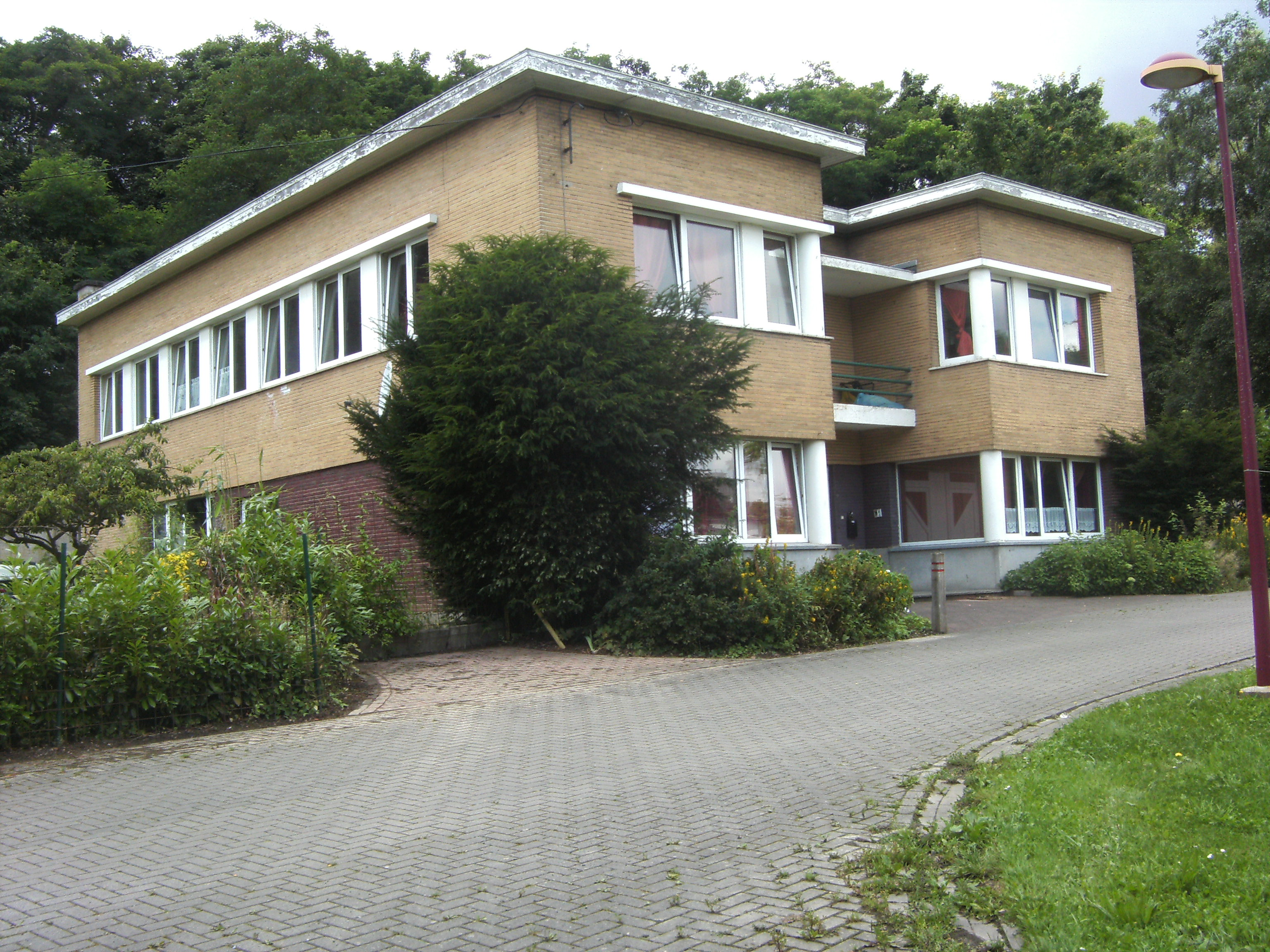 Marcinelle (Charleroi-Belgique) - avenue Mascaux - Cité de l'Enfance - pavillon - architecte Marcel Leborgne - 1938.